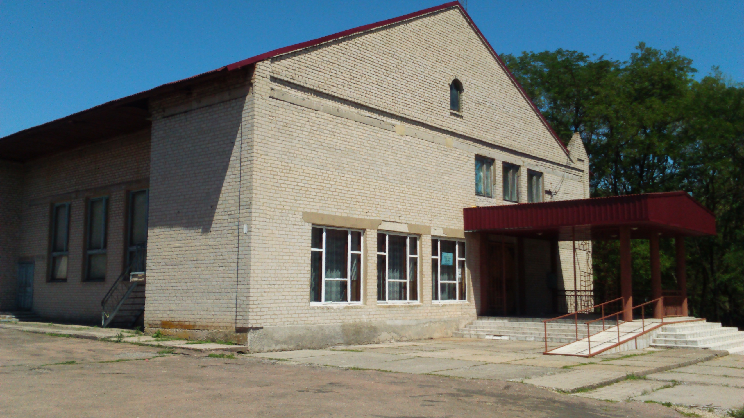 Ві́рівка — село в Україні, Добропільському районі Донецької області.